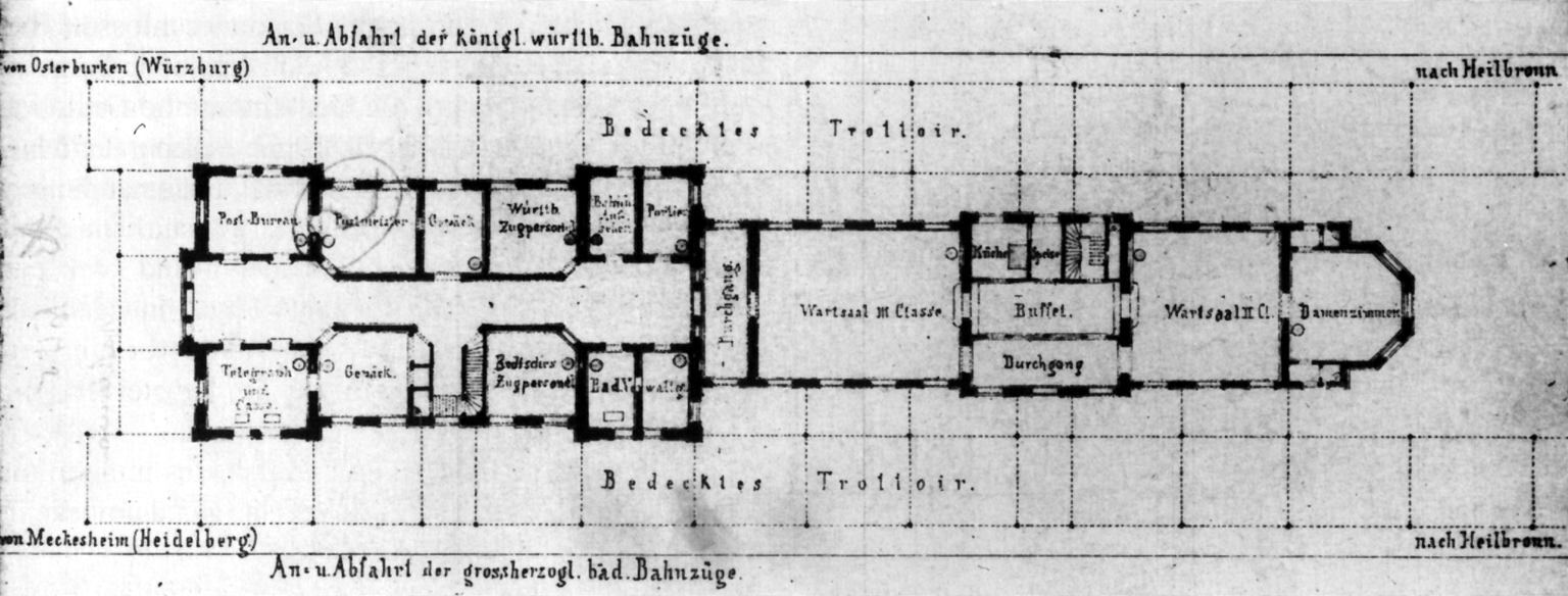 Bahnhof in Jagstfeld, Grundriss des Erdgeschosses des ersten Empfangsgebäudes.